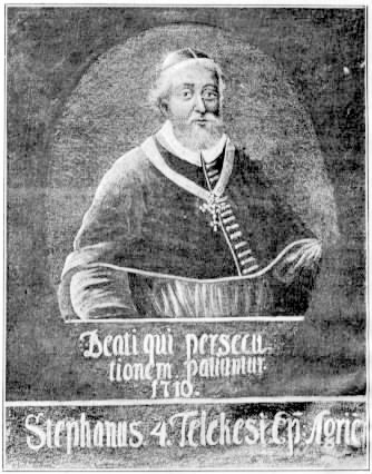 Telekesi István (1633–1715) egri püspök (1699–1709, 1711–1715) portréja.